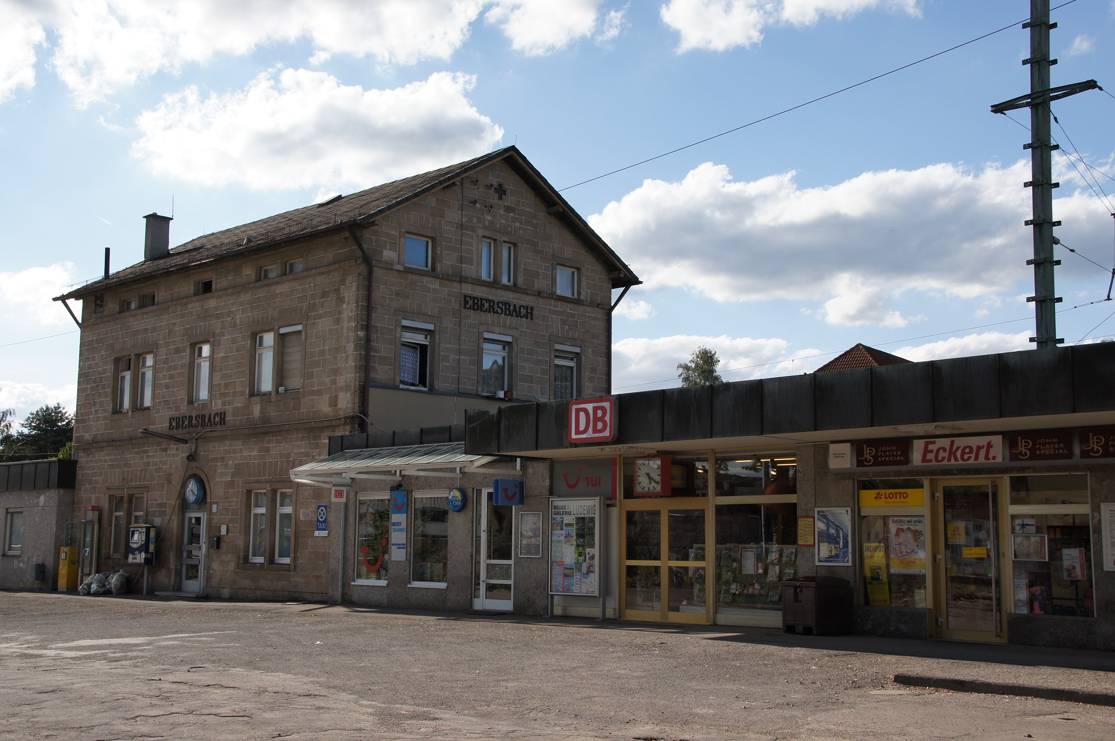 Empfangsgebäude Ebersbach (Fils)